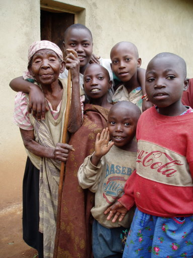 Projekte Afrika Franziskaner Mission